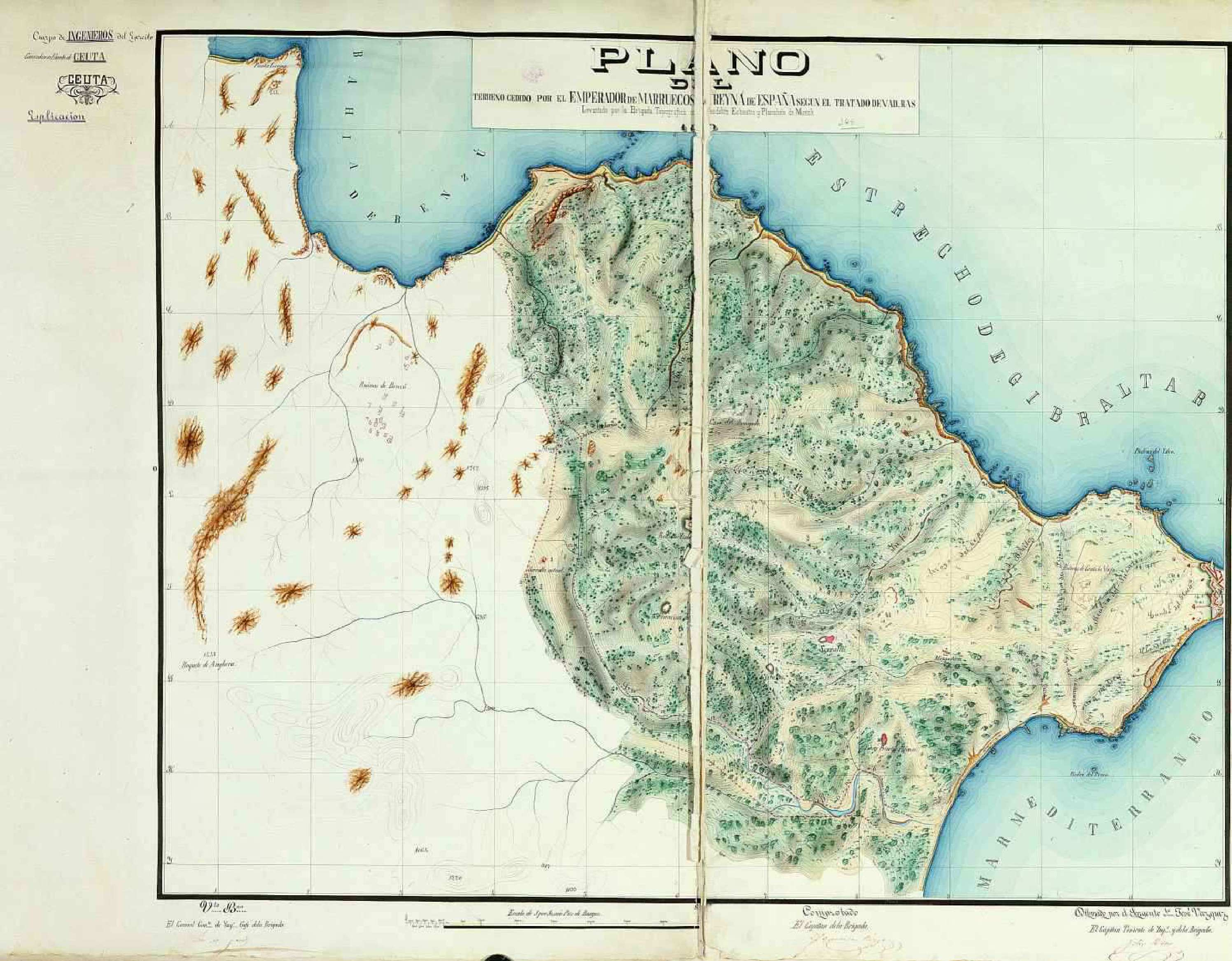 Ceuta. Fronteras. 1860 Título: Plano del Terreno cedido por el Emperador de Marruecos a la Reyna de España según el Tratado de Vad Ras ; Levantado por la Brigada Topografica con el Teodolito Eclímetro y Plancheta de Munich en 1860 ; Dibujado por el Sargento 1º José Vazquez Escala: [ca. 1:14.000]. 1 por 10.000 Pies de Burgos [=19,4 cm] Autores: Cadalso, José (1741-1782) ; Gómez, León de ; Rizzo, Francisco ; Recio, Félix ; Brigada Topográfica Fecha: 1860 Tipo de Documento: Material cartográfico manuscrito